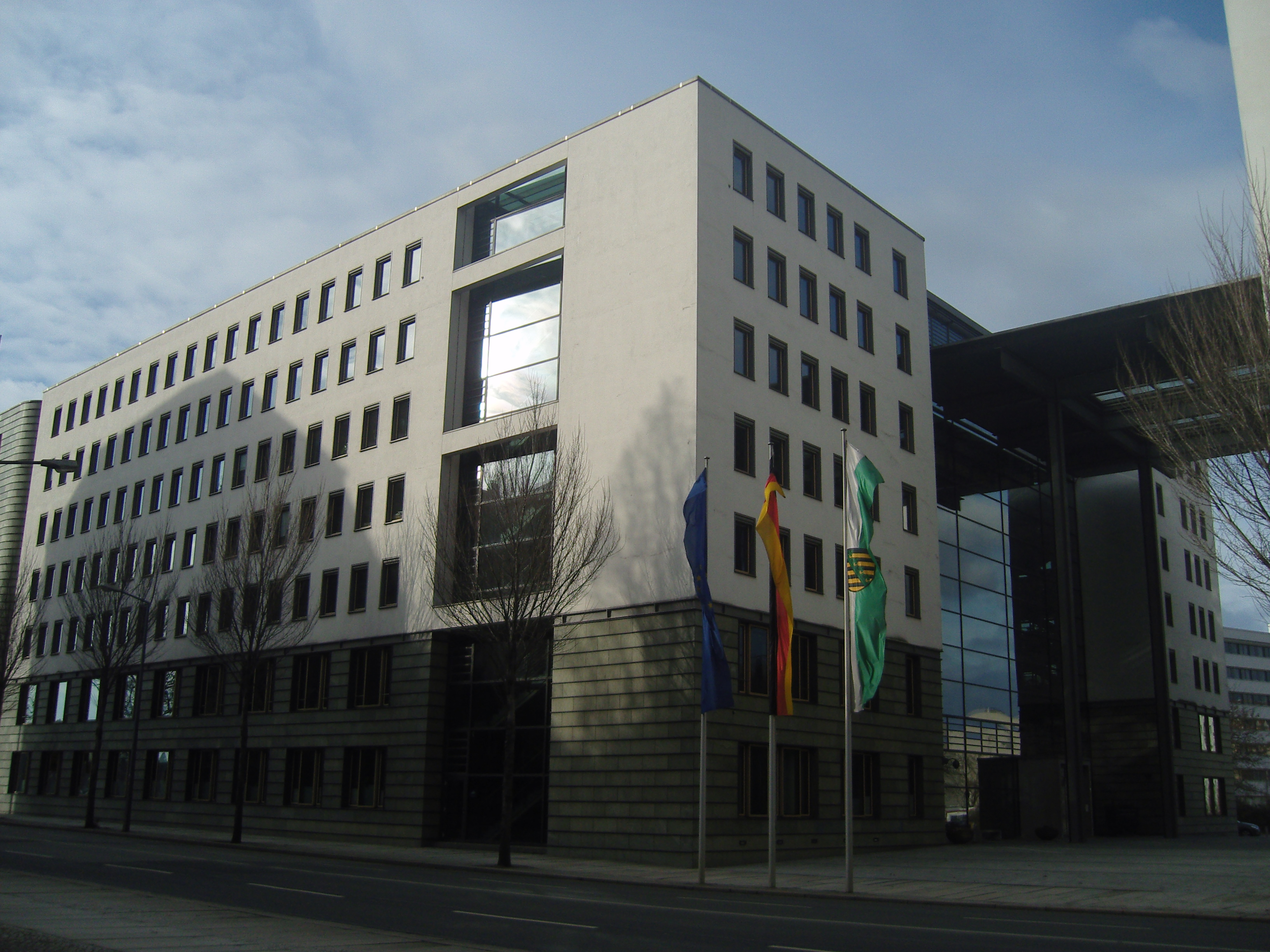 Gebäude des Sächsischen Staatsministerium für Wirtschaft, Arbeit und Verkehr, Ansicht Wigardstraße